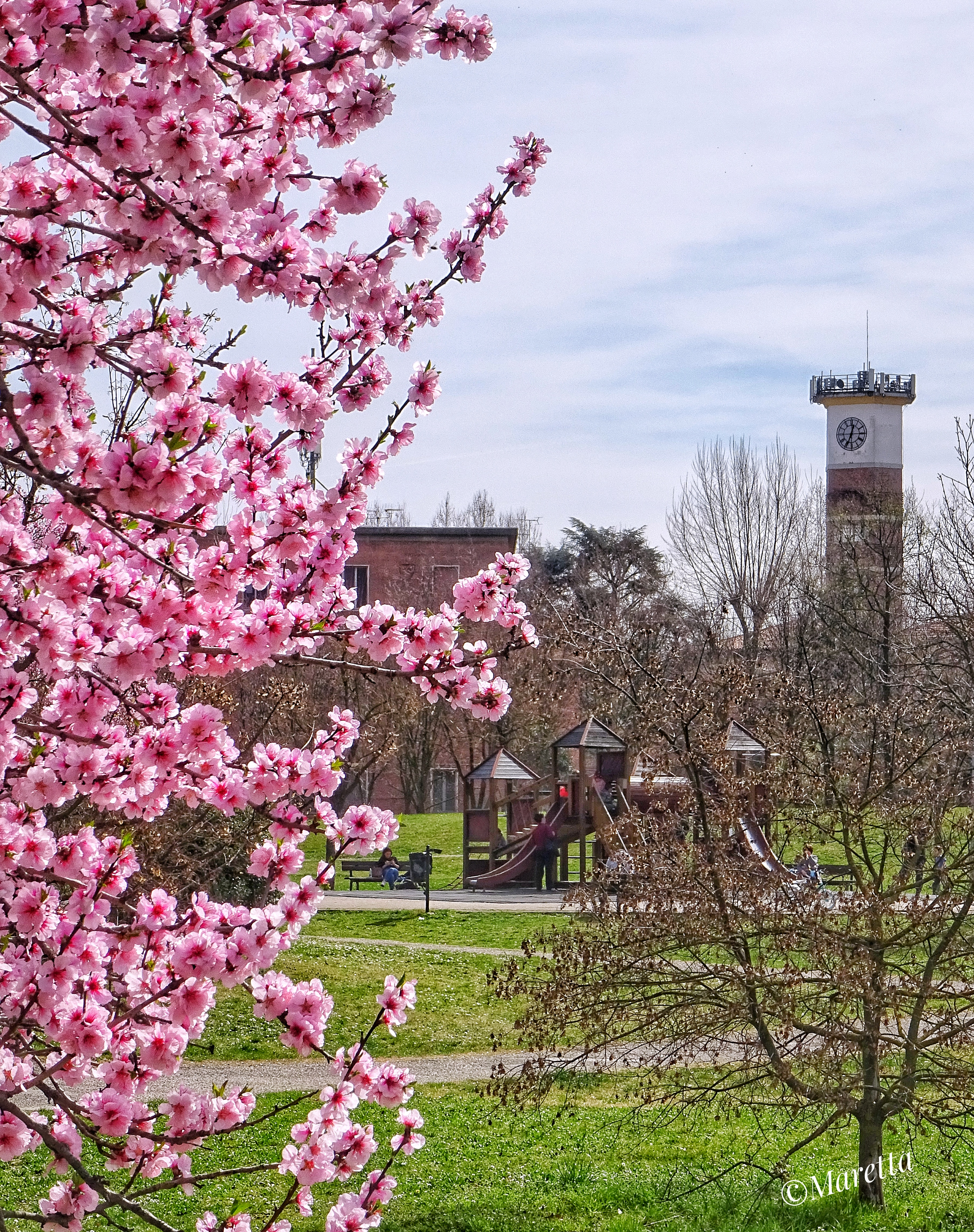 Parco Rodari This is a photo of a monument which is part of cultural heritage of Italy.